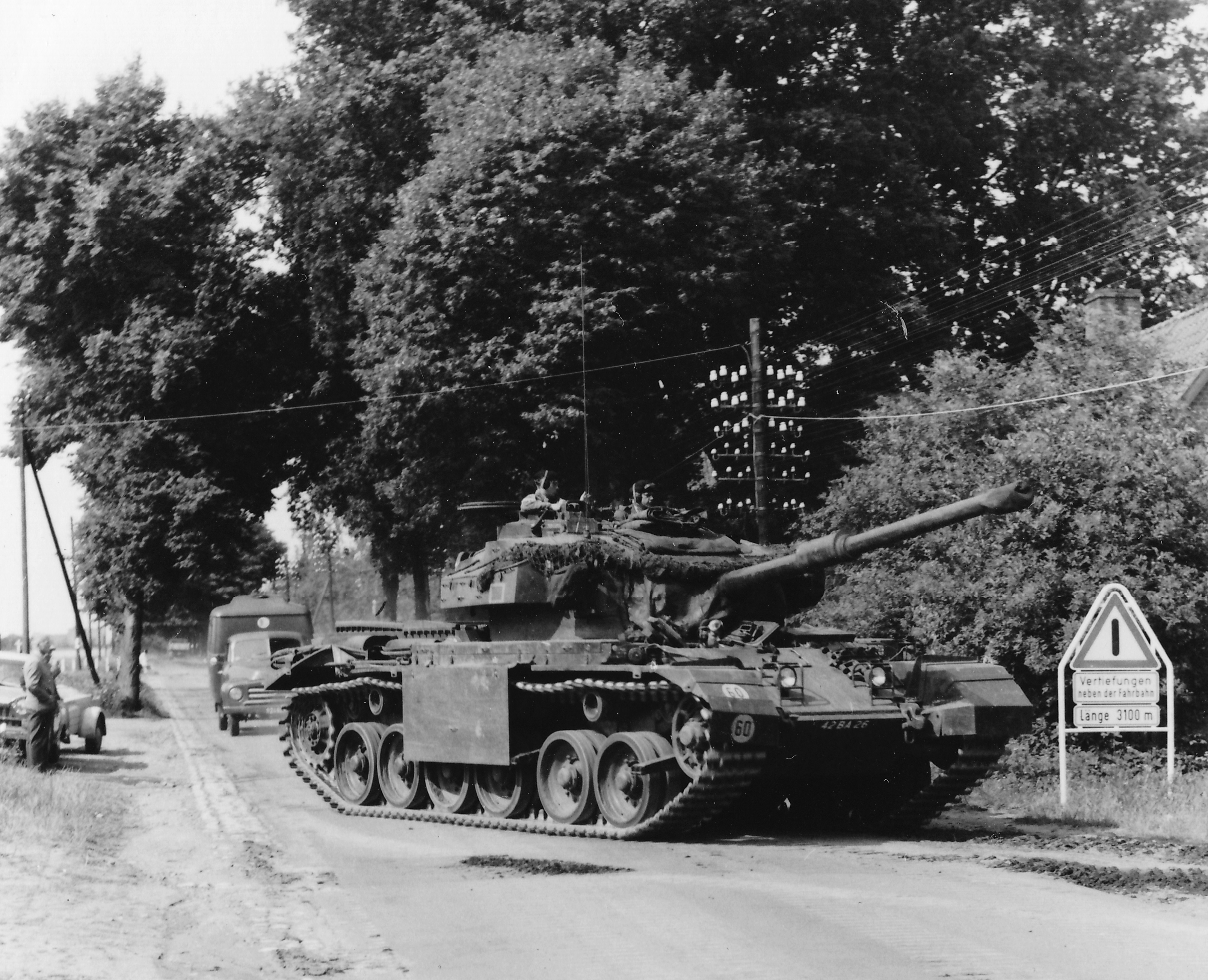 Centurion-Panzer in der Lüneburger Heide bei Schneverdingen, 1963